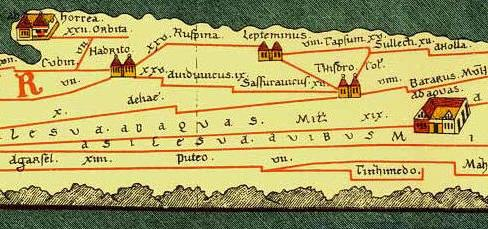 Deel van Tabula Peutingeriana met Ruspina en Leptiminus